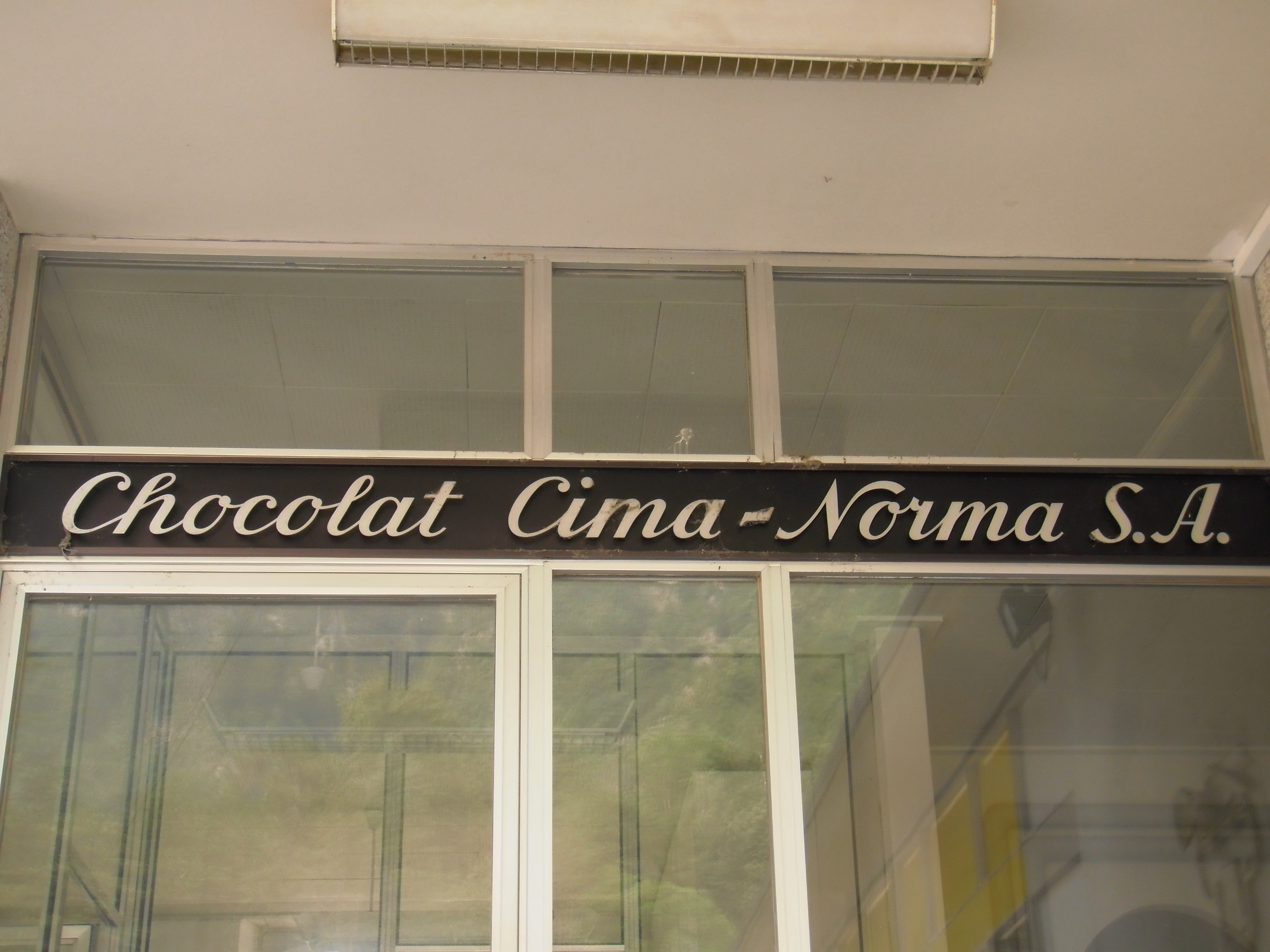 Schriftzug über dem Eingang zum Gebäude